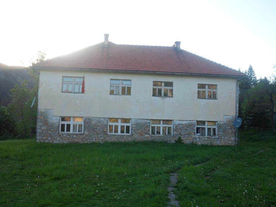 Školska zgrada na Jelovom Panju